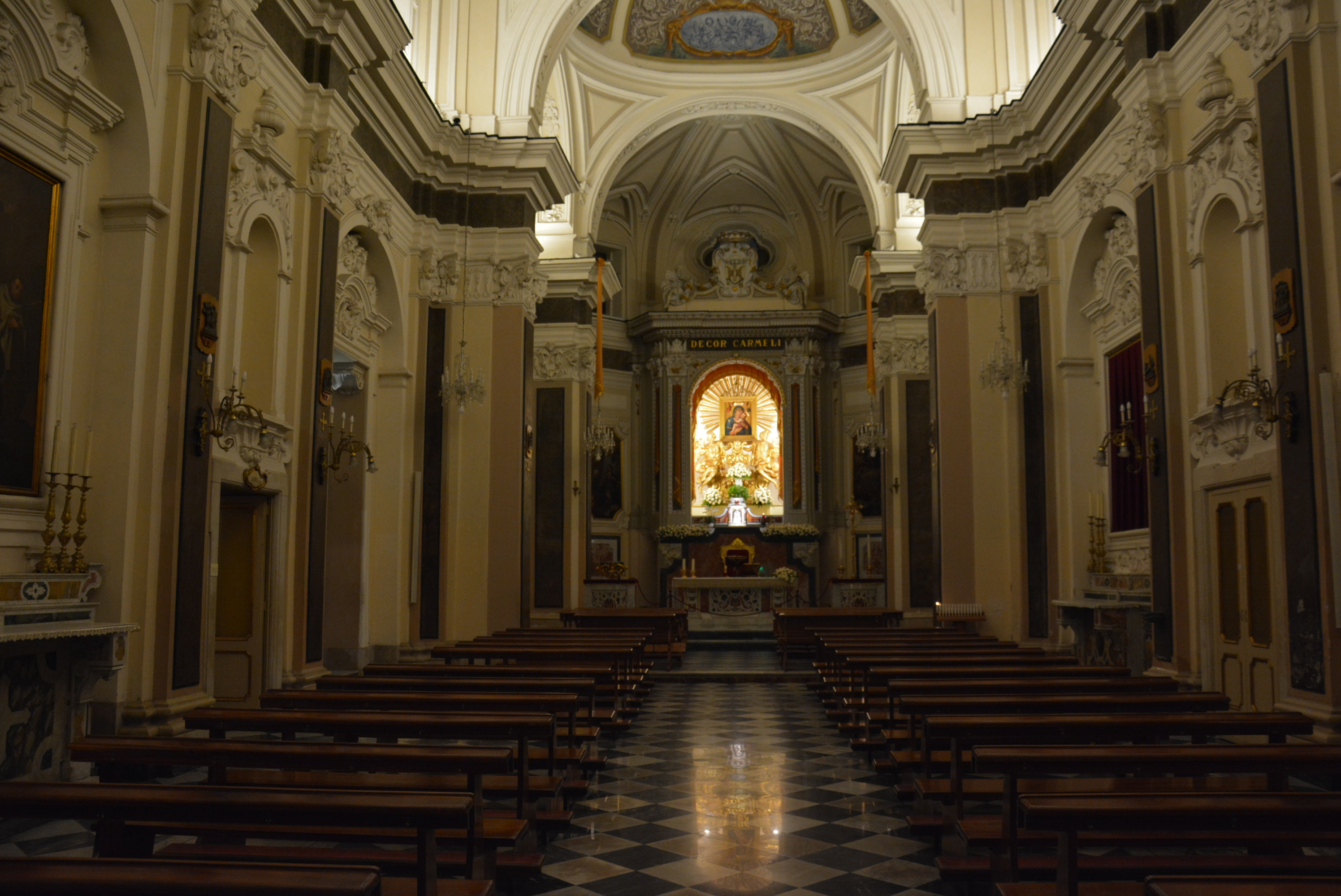 Santuario della Madonna del Carmine a Sorrento